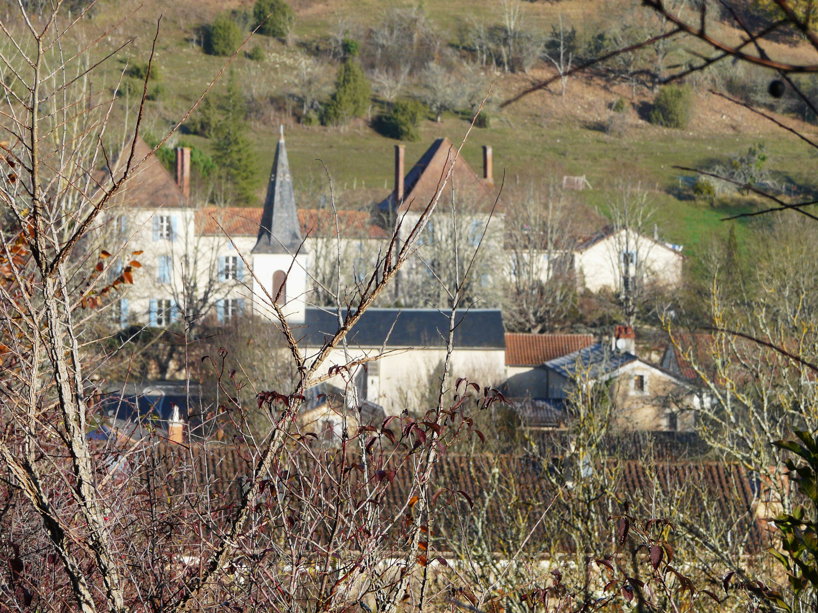 Le village de Saint-Paul-de-Serre, Dordogne, France.